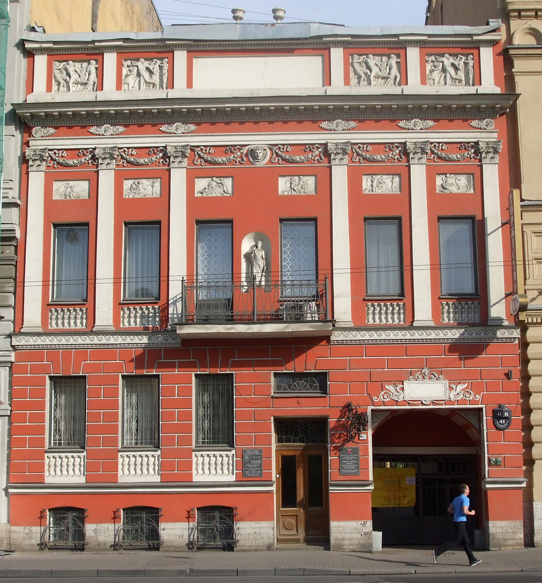 Суворовский проспект, 41, Санкт-Петербург. Особняк А. А. Экарева. Построен в 1891 году Антоном Сергеевичем Лыткиным (1841-1901), перестроен в 1915 - Алексеем Александровичем Экаревым